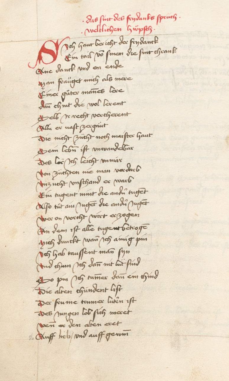 Freidank in: Sprüche und Mären, Ostschwaben um 1464